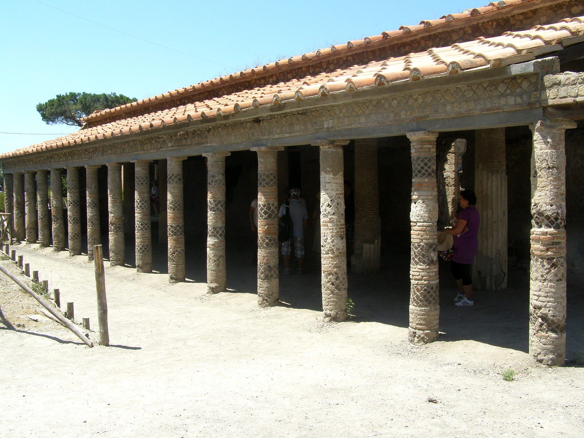 Priečelie Vily Mystérií